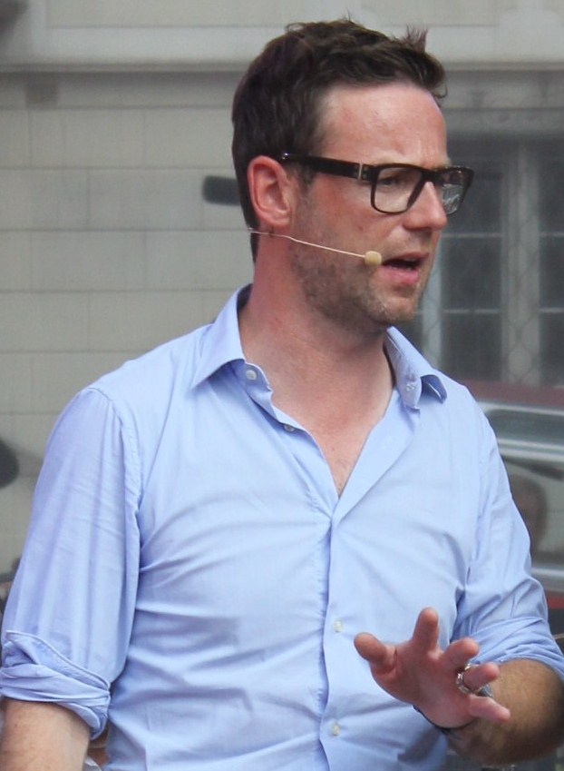 Nik Hartmann, Moderator der Fernsehsendung "SF bi de Lüt", während der Probe vor einer Livesendung (August 2012).